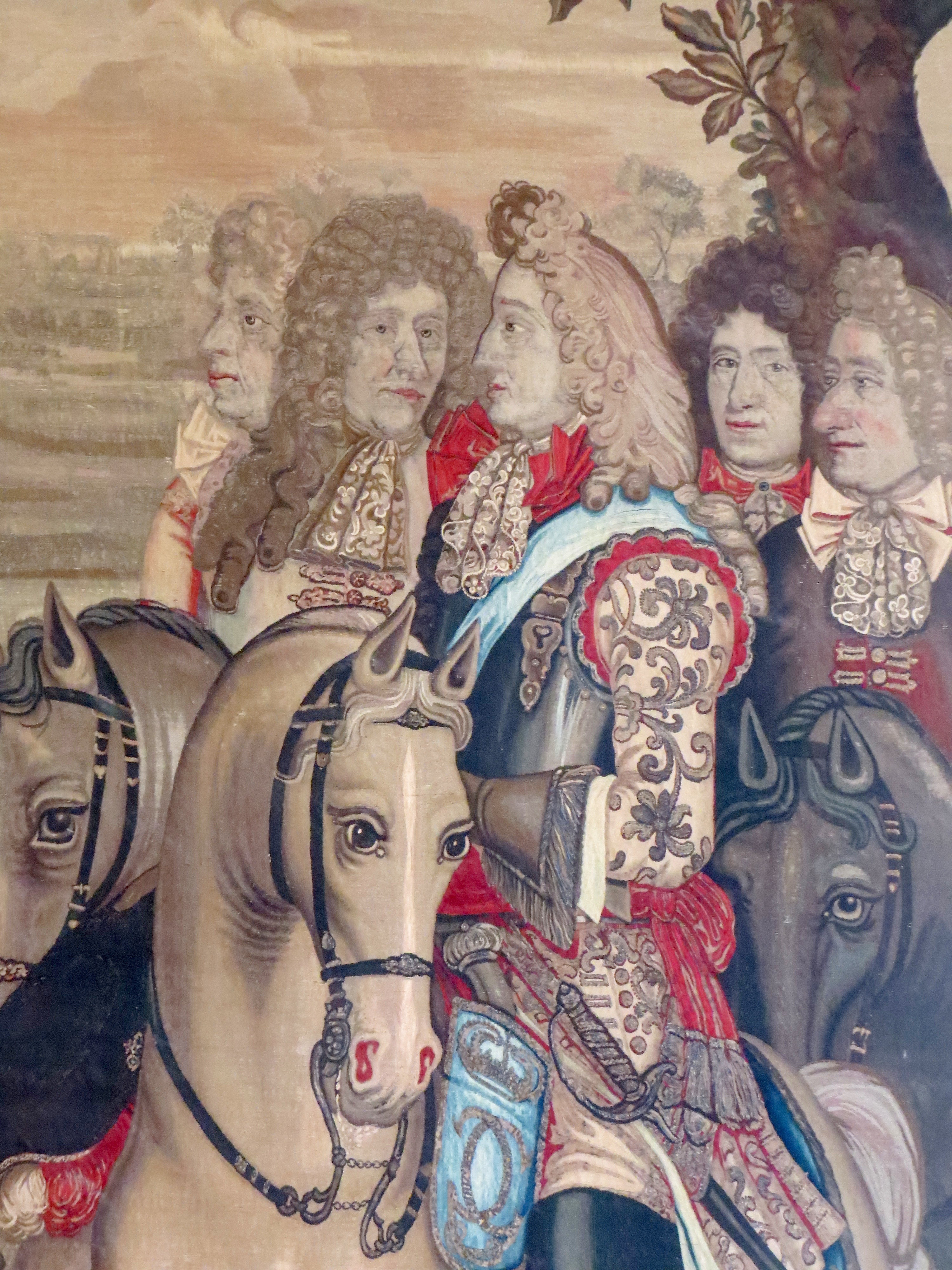 Prins Jørgen af Danmark og Norge ved Damgartens erobring i 1675. Detalje fra gobelin på Rosenborg Slot, København